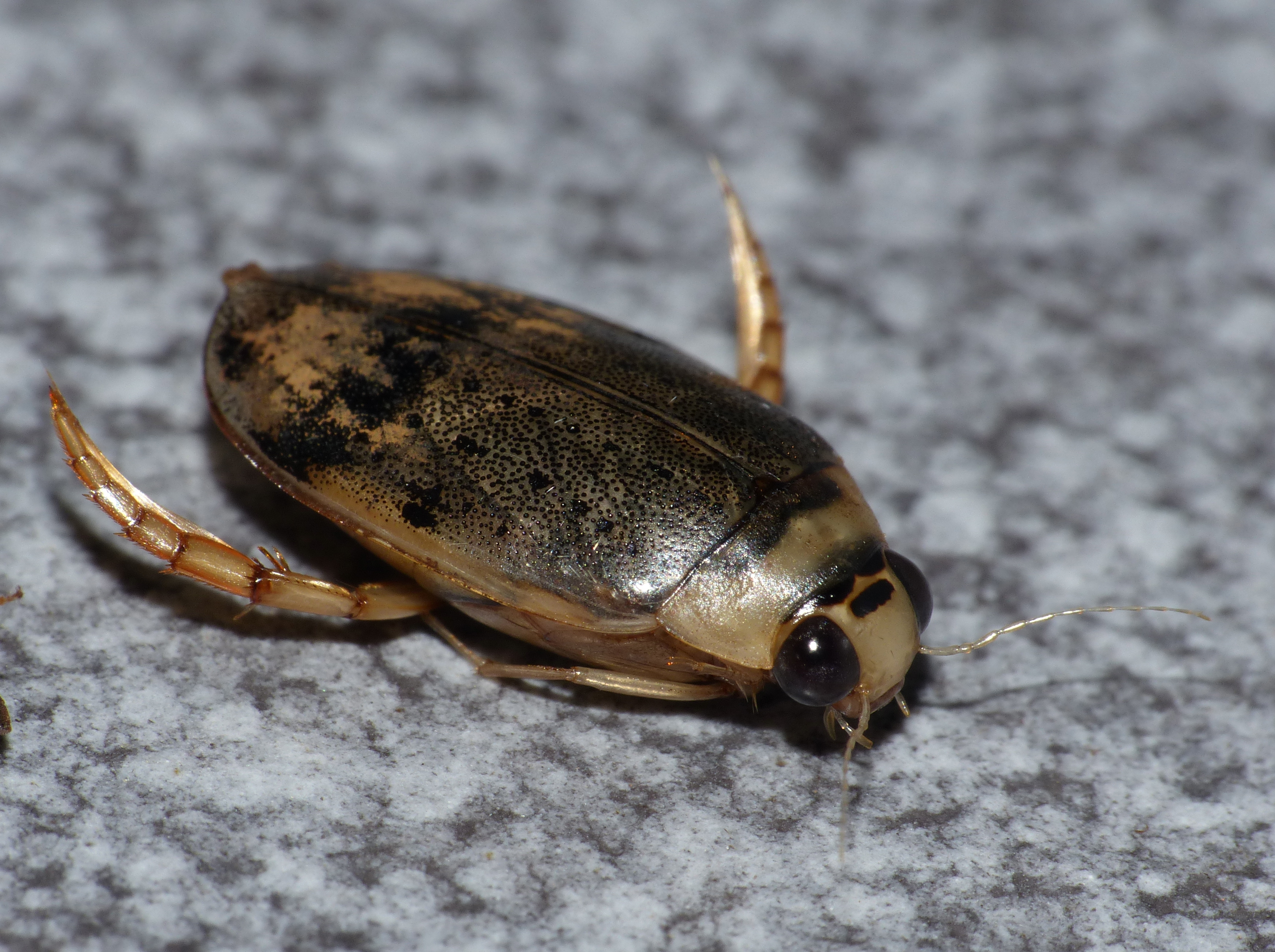 Safari Tent N°12, Lower Sabie Camp, Kruger NP, SOUTH AFRICA